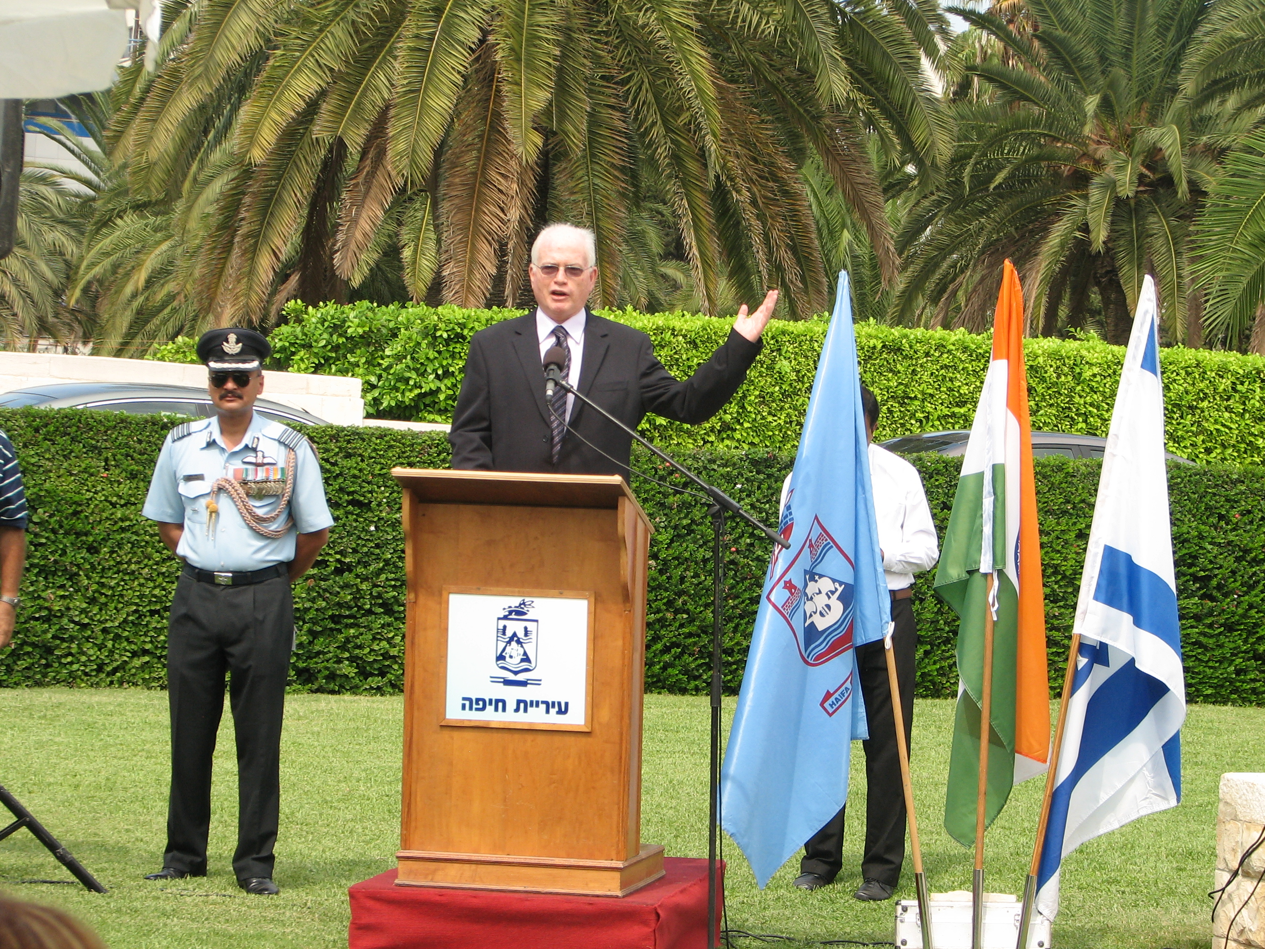 Amos Gilad in Indian fallen soldiers in First World War on the Battle of Haifa ceremony. אלוף במילואים עמוס גלעד נושא דברים בטקס שנערך בחיפה בבית הקברות הצבאי הבריטי לזכרם של החיילים ההודים שנפלו במלחמת העולם הראשונה בקרב על חיפה